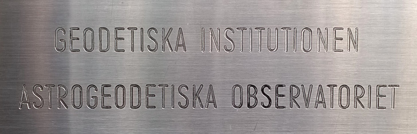 Institutionsskylt på observatoriekupolens vägg